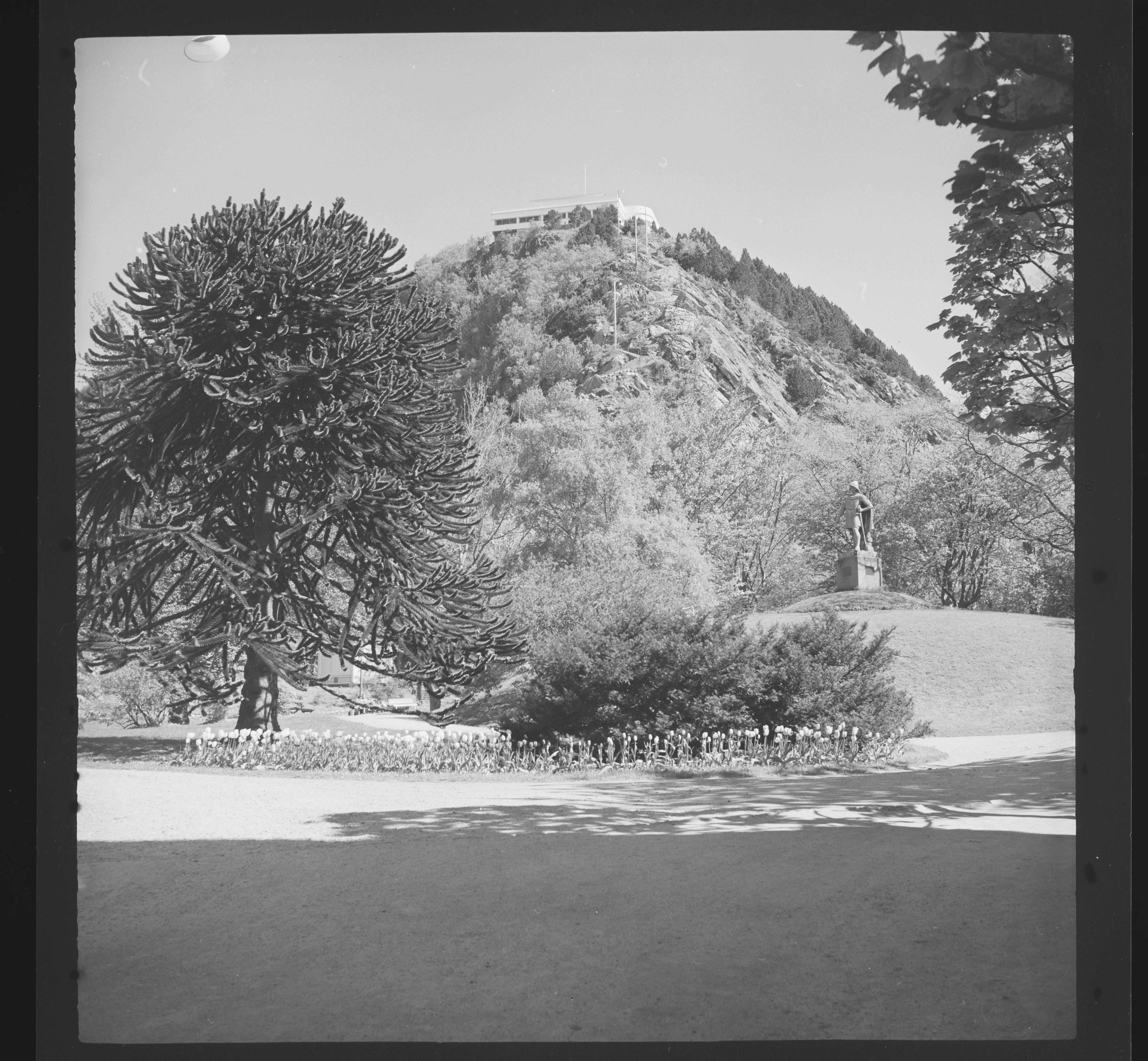 Bildet er hentet fra Nasjonalbibliotekets bildesamling. Anmerkninger til bildet var: Fotograf: E-KQ Aksla,Byparken,Ålesund, Ålesund, Møre og Romsdal